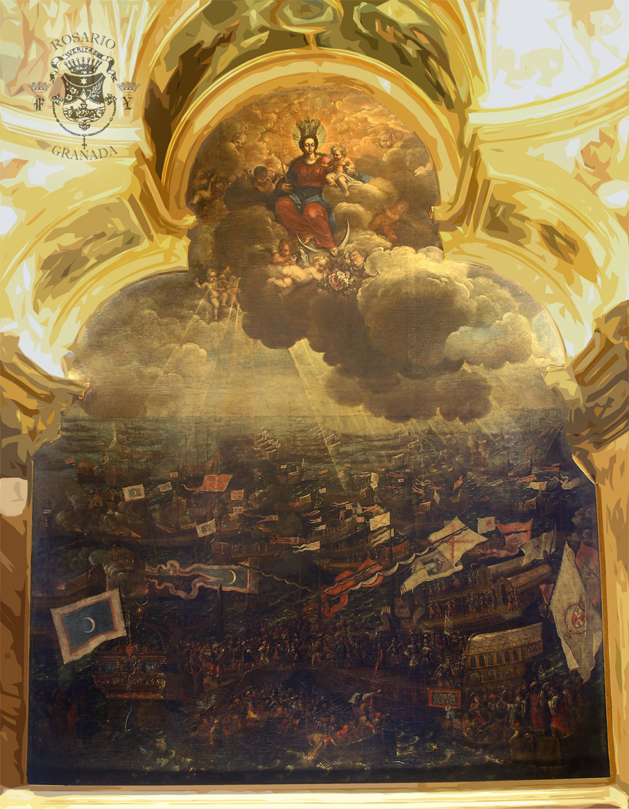 Cuadro de la Batalla de Lepanto del Camarín de la Virgen del Rosario de Granada.